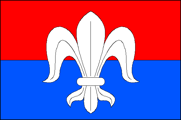 vlajka, Nový Šaldorf Sedlešovice, okres Znojmo